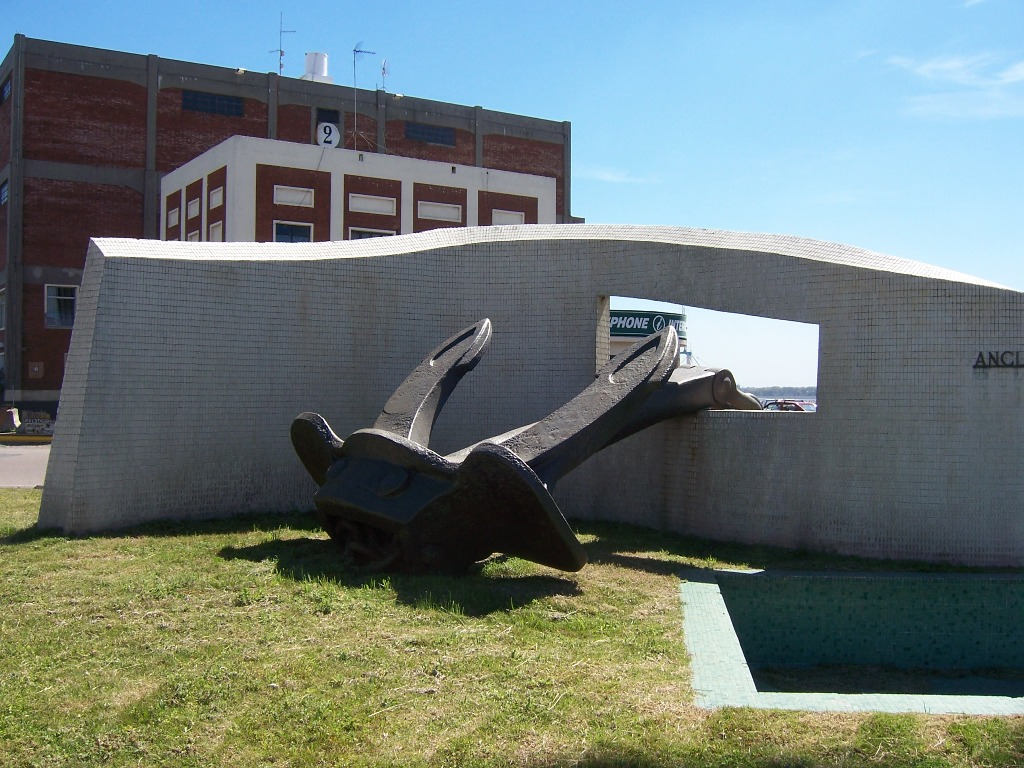 Ancla del Graf Spee exhibida en el puerto de Montevideo.